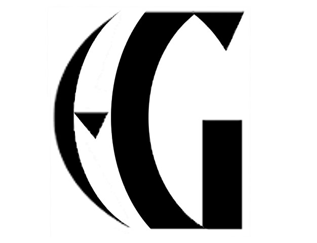 Logo